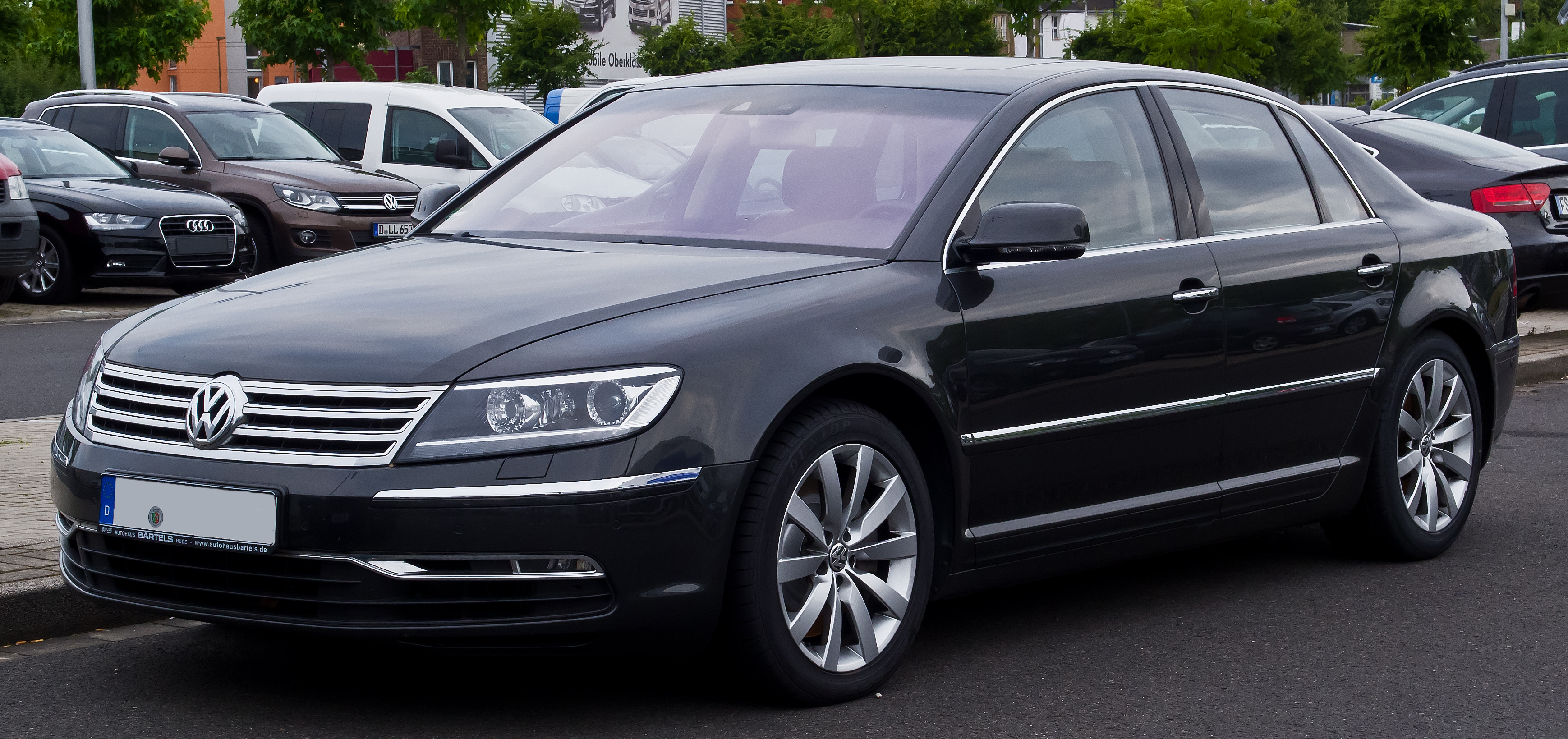 VW Phaeton 3.0 V6 TDI 4MOTION (2. Facelift)